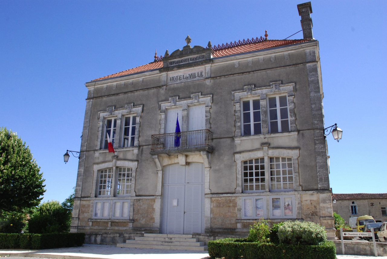 Tusson, l'Hôtel de ville